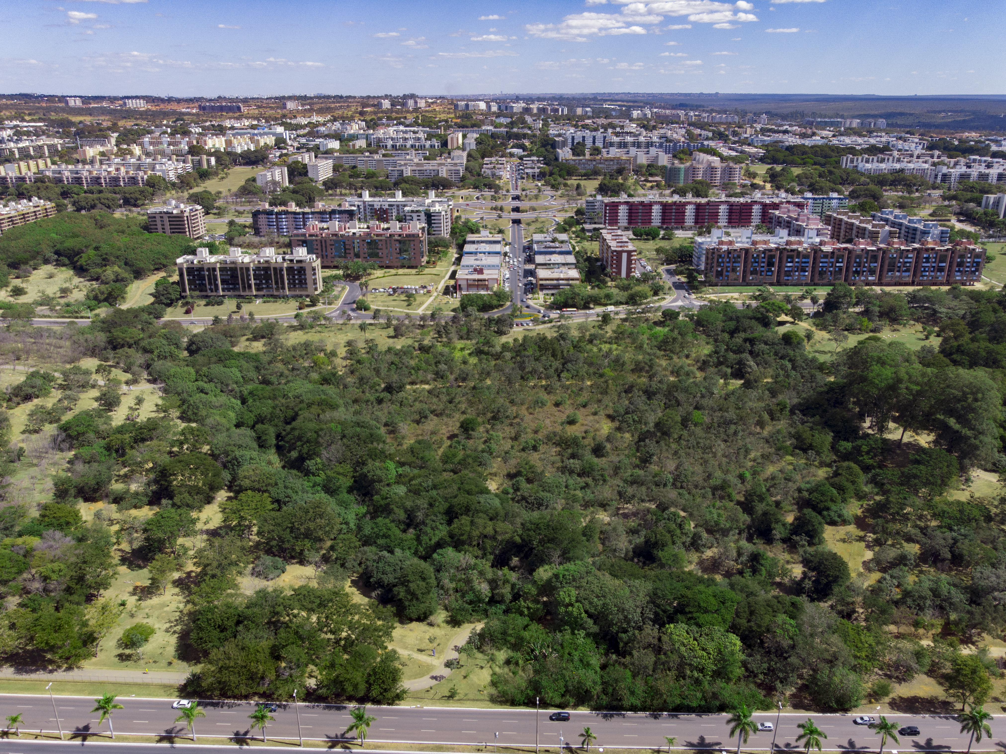 Parque Olhos D'água fotografado por um drone DJI Mavic Air a 120 metros de altura sobre a L4 Norte próximo à quadra 413 ao meio-dia.